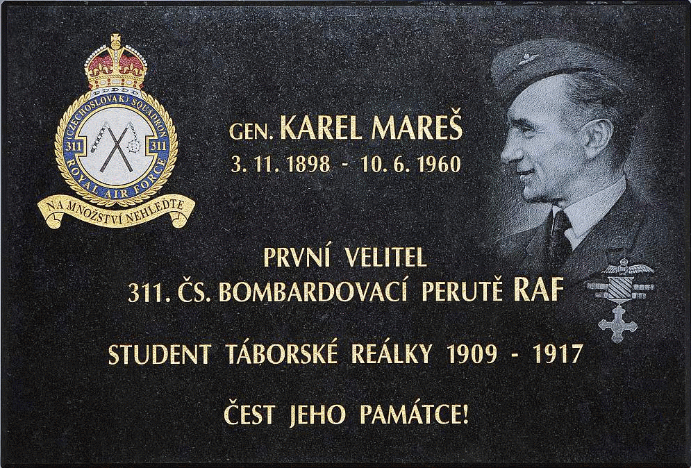 Dne 10. června 2015 (v den 55. výročí jeho smrti) byla ve vnitřních prostorách Gymnázia Pierra de Coubertina v Táboře (Gymnázium Pierra de Coubertina v Táboře, Náměstí Františka Křižíka 860, 390 01 Tábor) odhalena pamětní deska upomínající na osobnost brigádního generála Karla Mareše. Pamětní deska je zhotovena z černého indického mramoru a pochází z dílny Petra Šebesty. Na pamětní desce je nápis: „gen. Karel Mareš / 3.11.1898 - 10.6.1960 / první velitel / 311. čs. bombardovací perutě RAF / student táborské reálky 1909 - 1917 / čest jeho památce“.